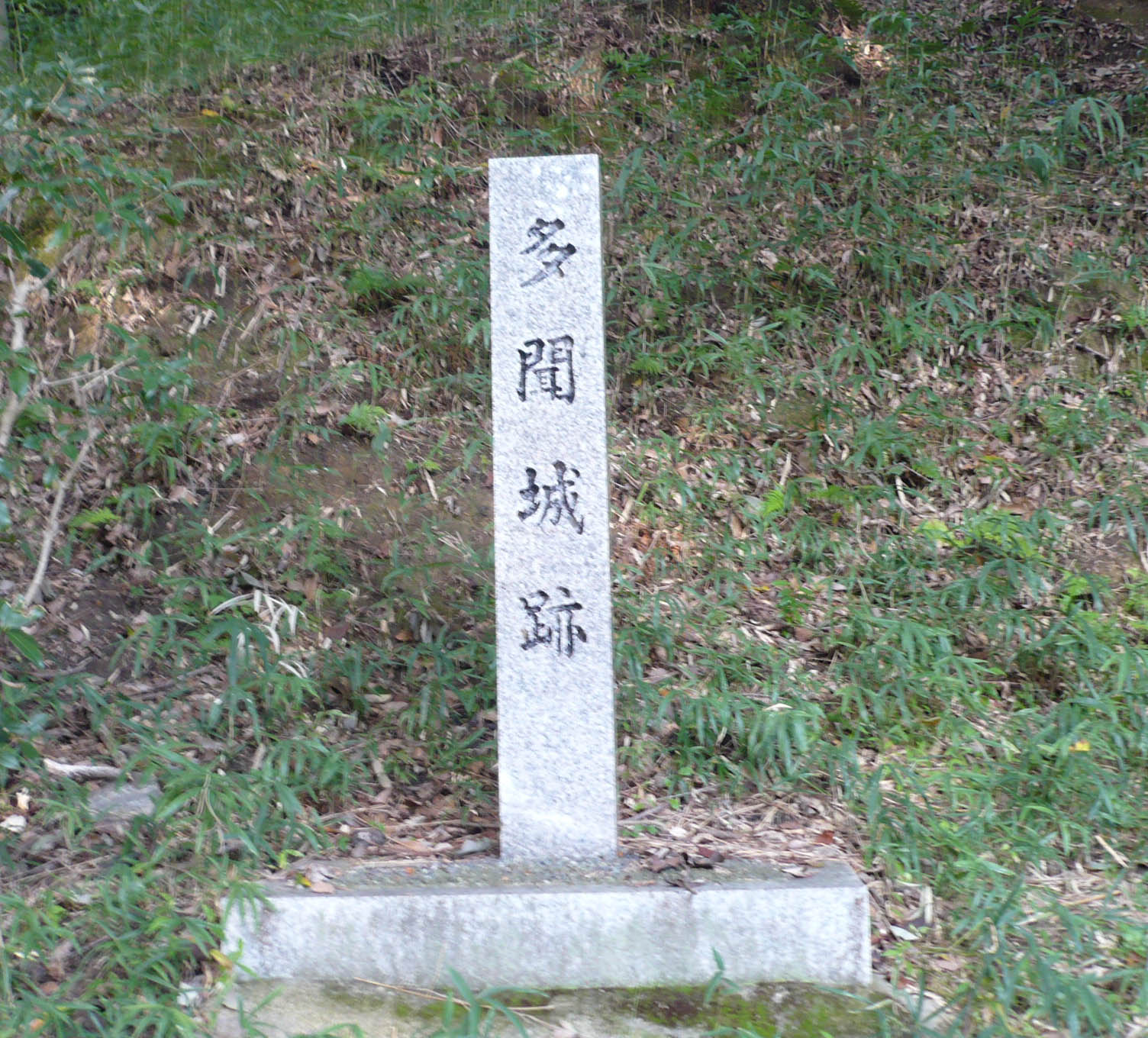 多聞城の石碑